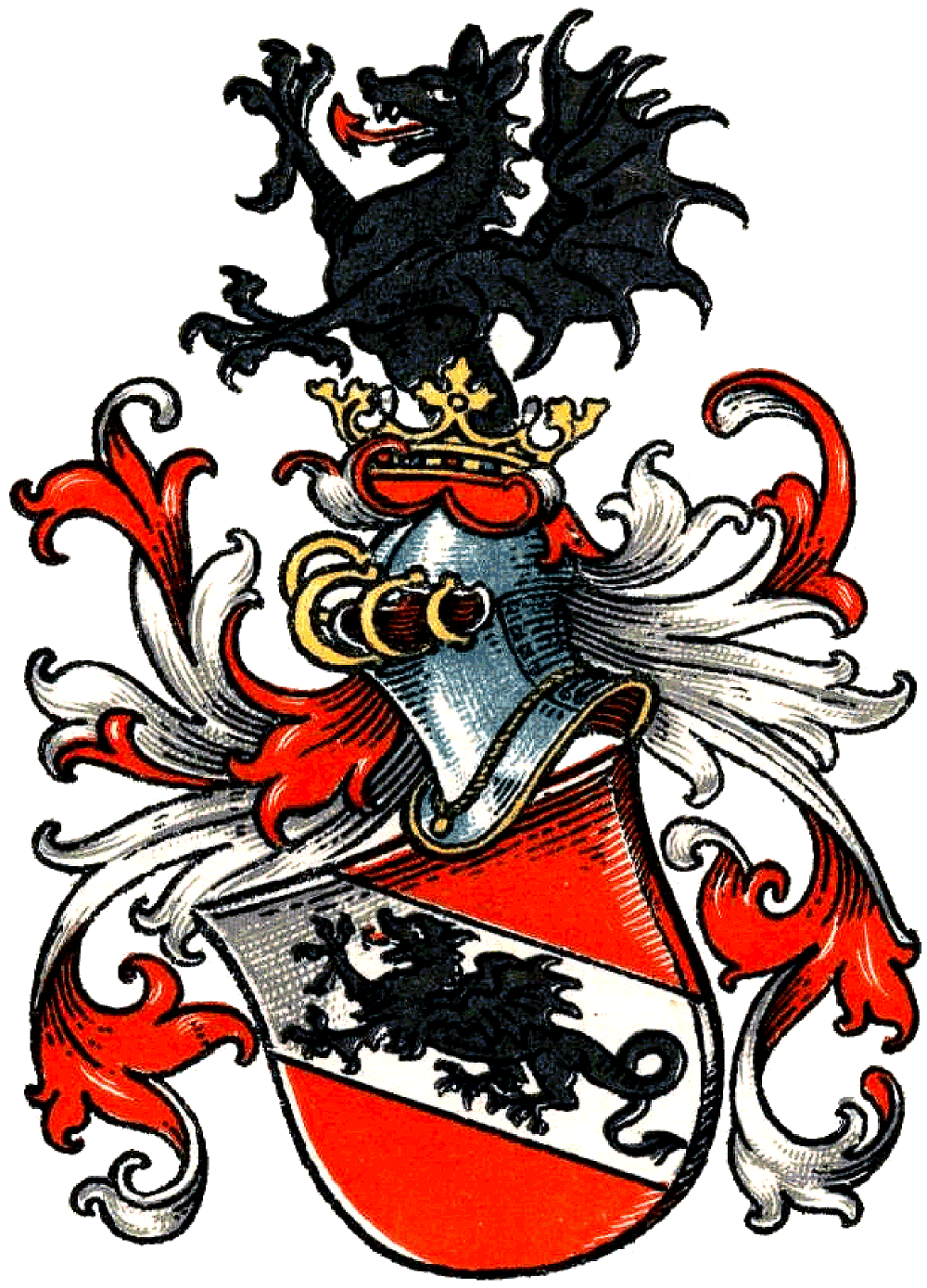 Wappen derer von der Wyndelen, Blasonierung